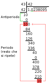 L'autore dell'immagine è il sottoscritto (Paolo Di Febbo). E' un esempio di divisione decimale (43 diviso 42) eseguita per trovare un numero periodico. Rilasciata sotto licenza CC-BY-SA 2.0.